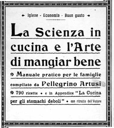 Cover of Pellegrino Artusi's La scienza in cucina e l'arte di mangiar bene from a 1910 edition.